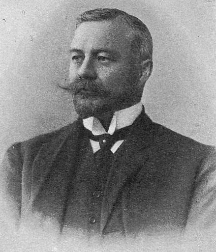 Щербатов Николай Борисович